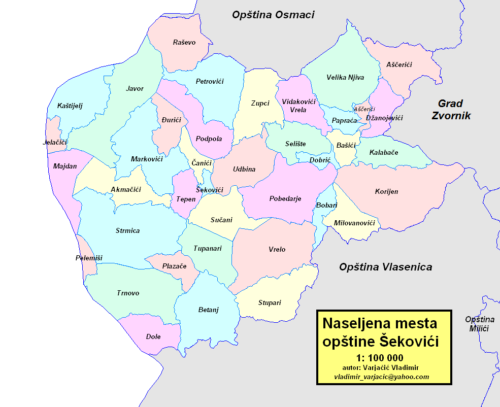 Opština Šekovići